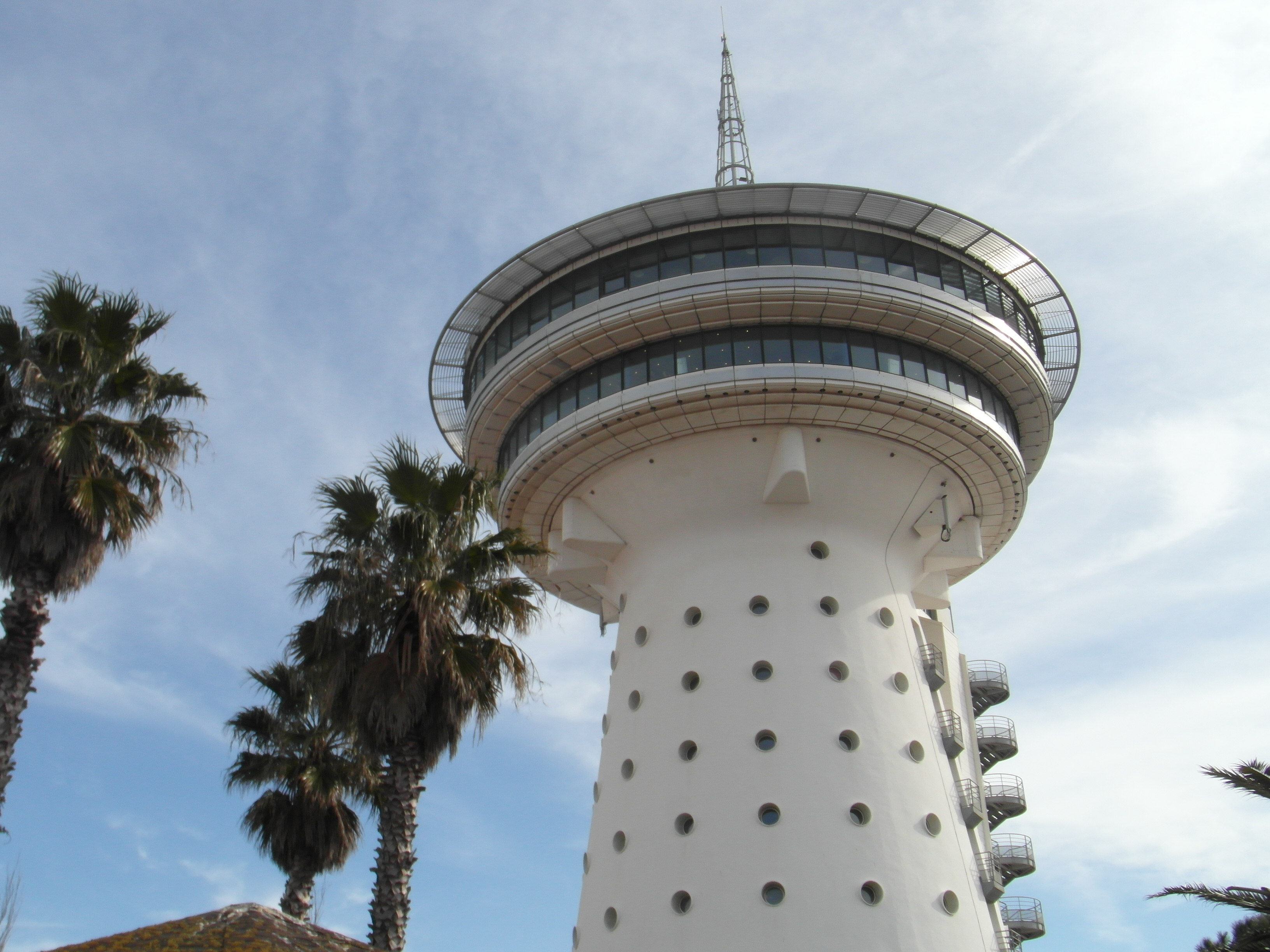 Phare de la Méditerranée en 2015